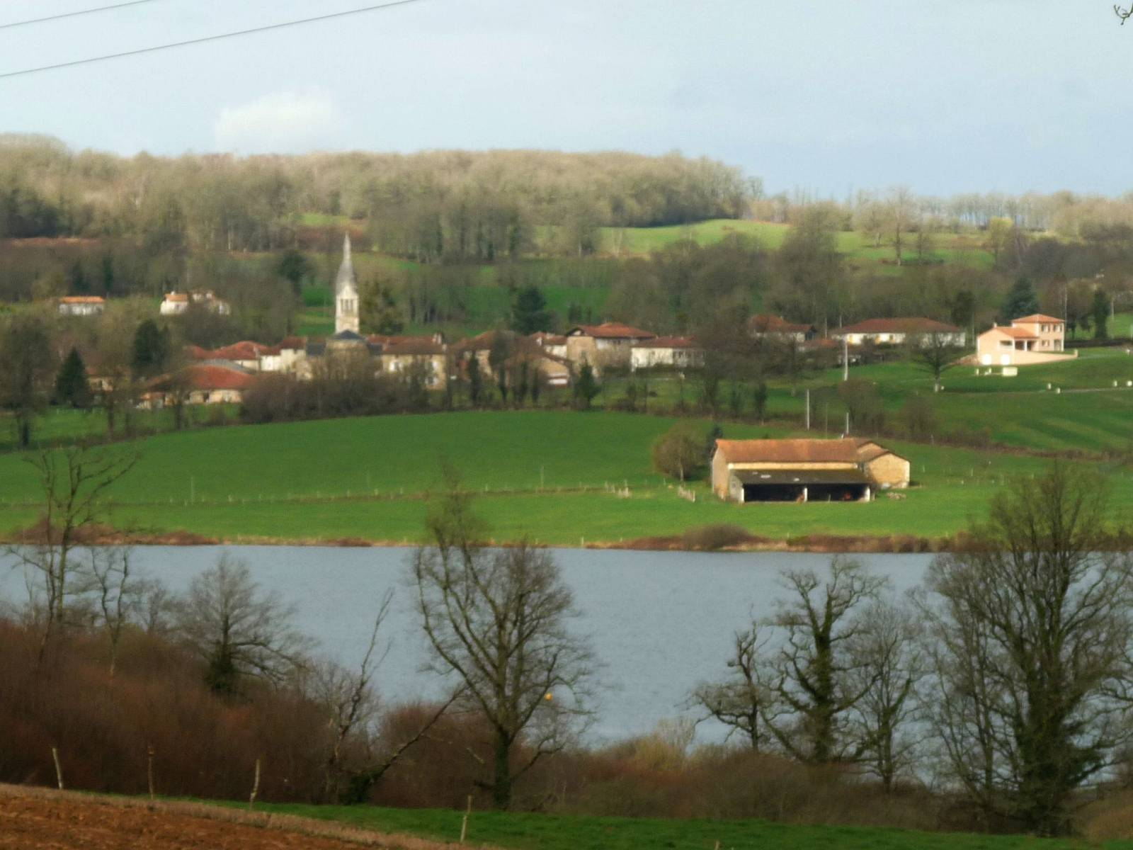 lac du Mas Chaban devant Lésignac-Durand, Charente, France